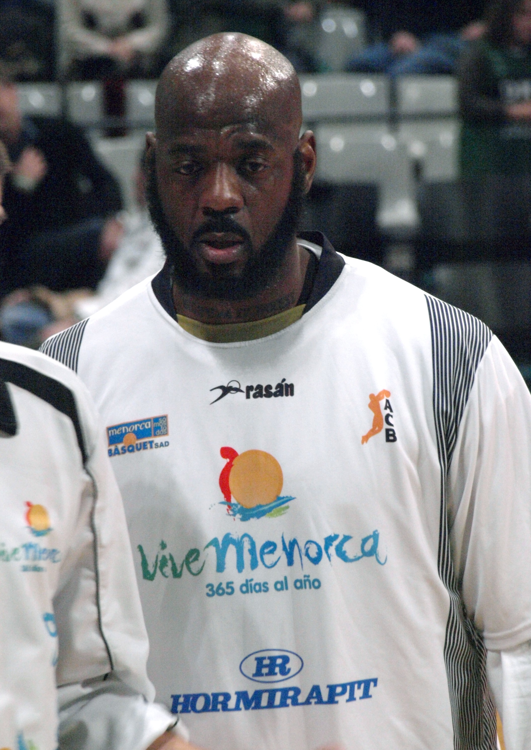 Bud Eley, en el partido que enfrentó al Vive Menorca y al DKV Joventut de liga ACB en el Olímpico de Badalona en enero de 2009.